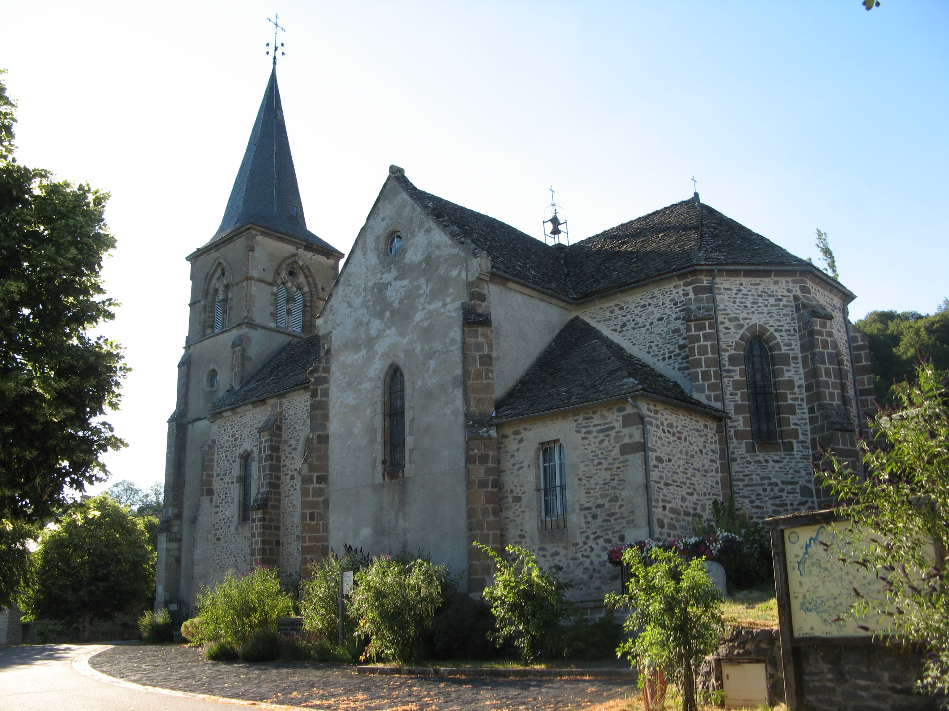 Auzers, église St-Pierre